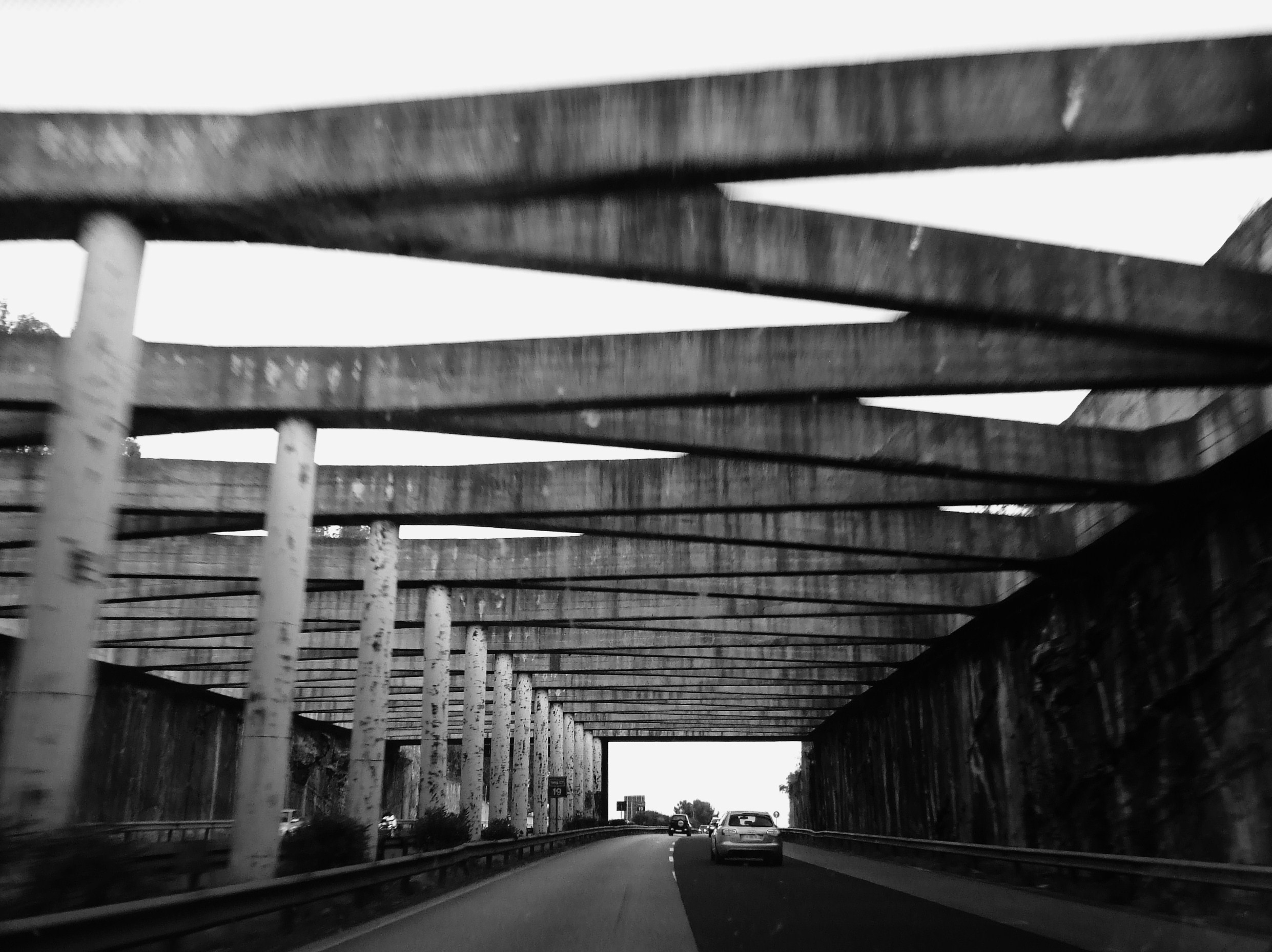 In viaggio (triangoli)